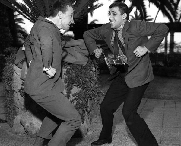 Cinematografico Italia